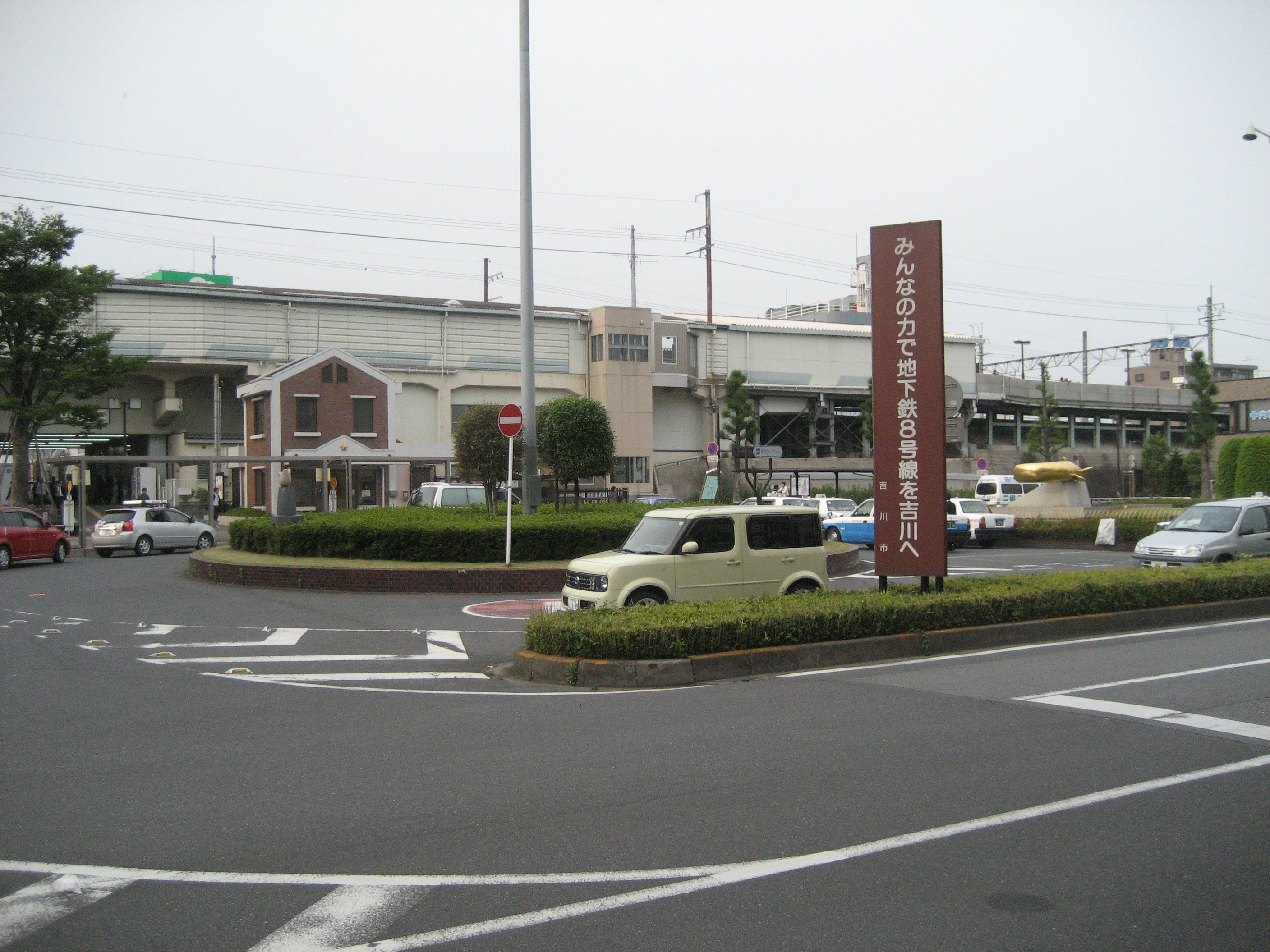 JR吉川駅南口駅前広場